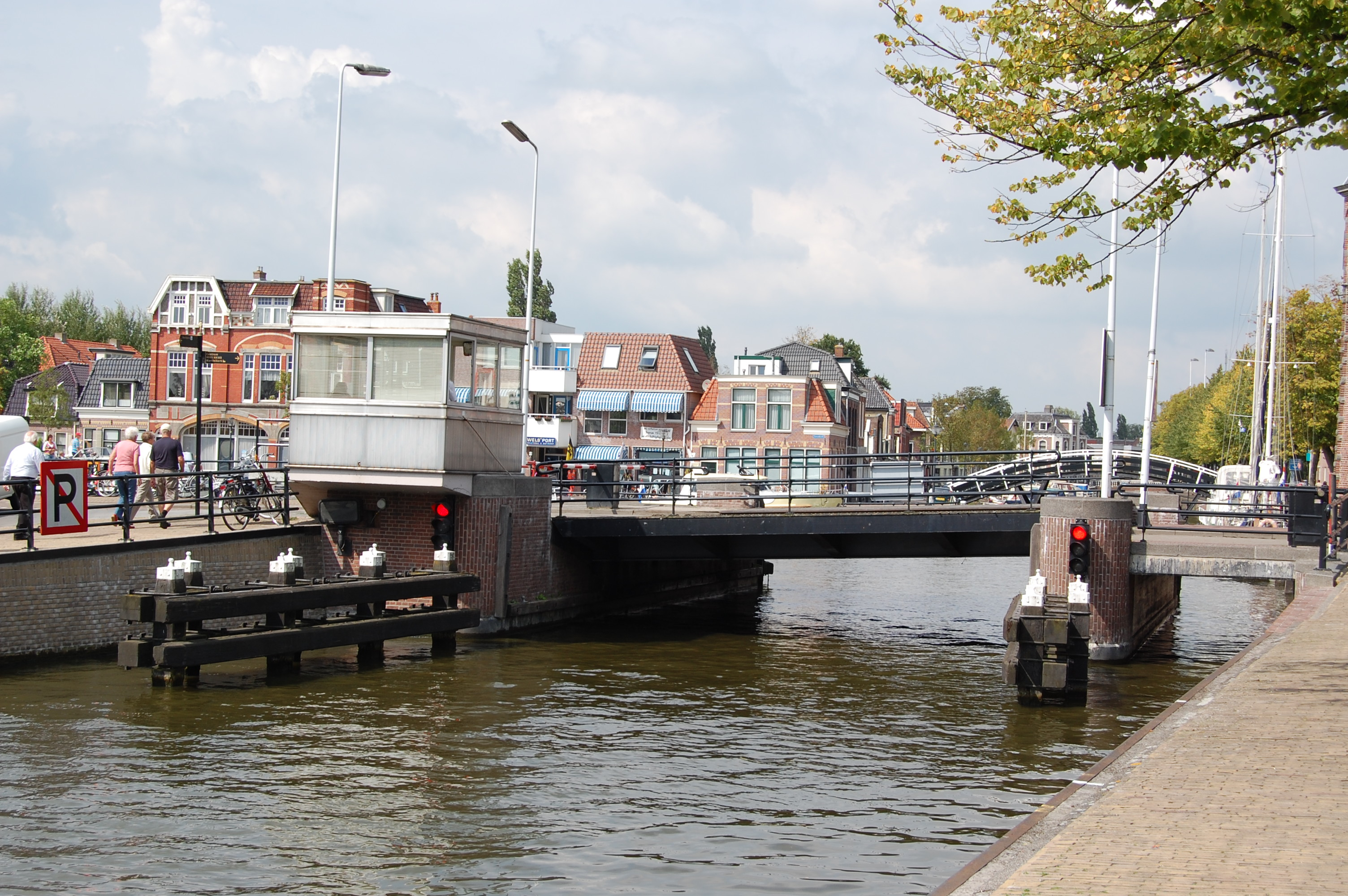 De Lemmerbrug in Sneek die toegang geeft vanuit de Geeuw tot de Stadsgracht